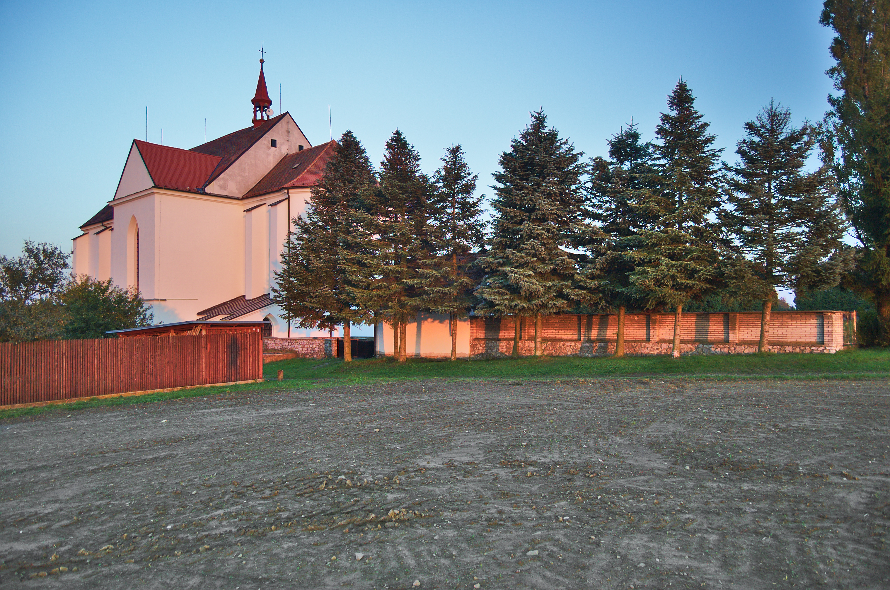 Kostel Narození Panny Marie, Lipovec, okres Blansko